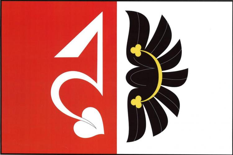 vlajka, Zahrádka, okres Třebíč